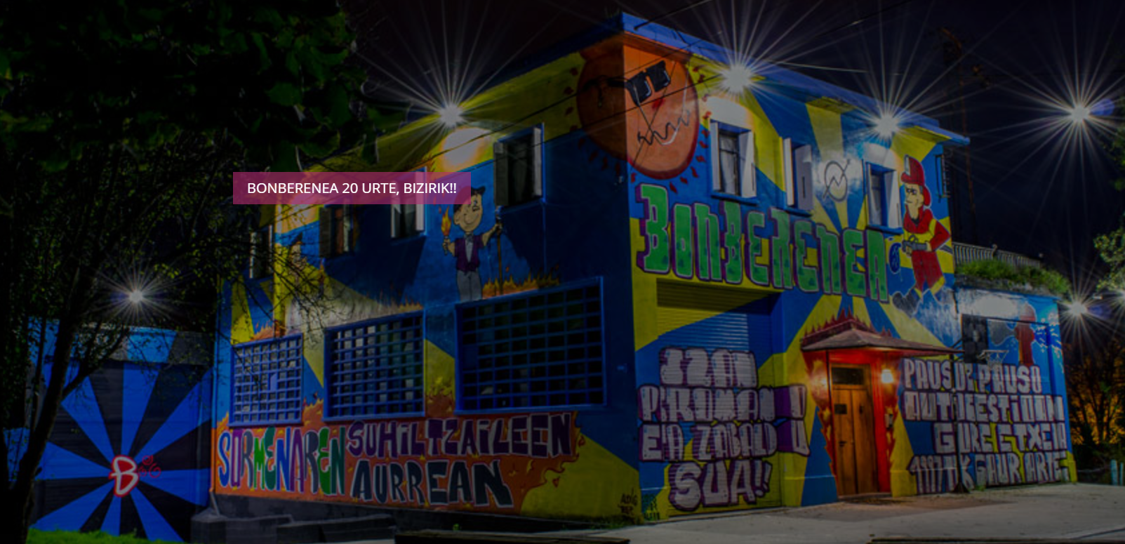 Bonberenea gauez.